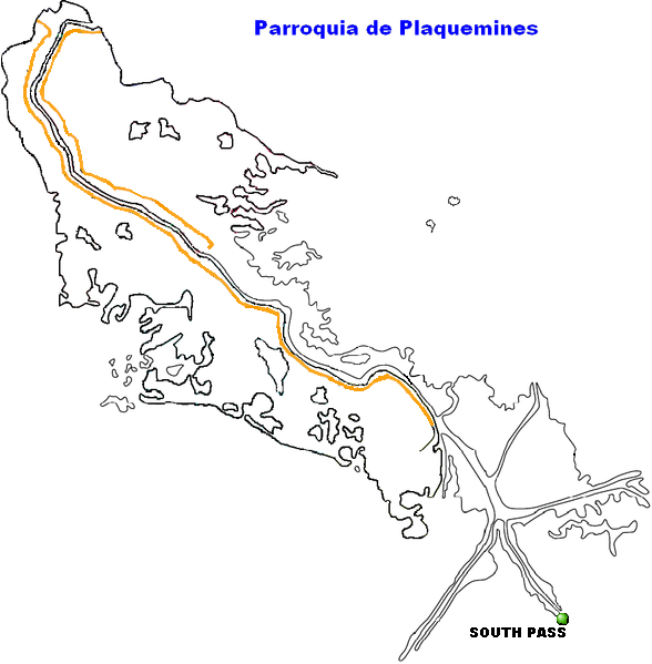 South Pass, Louisiana.